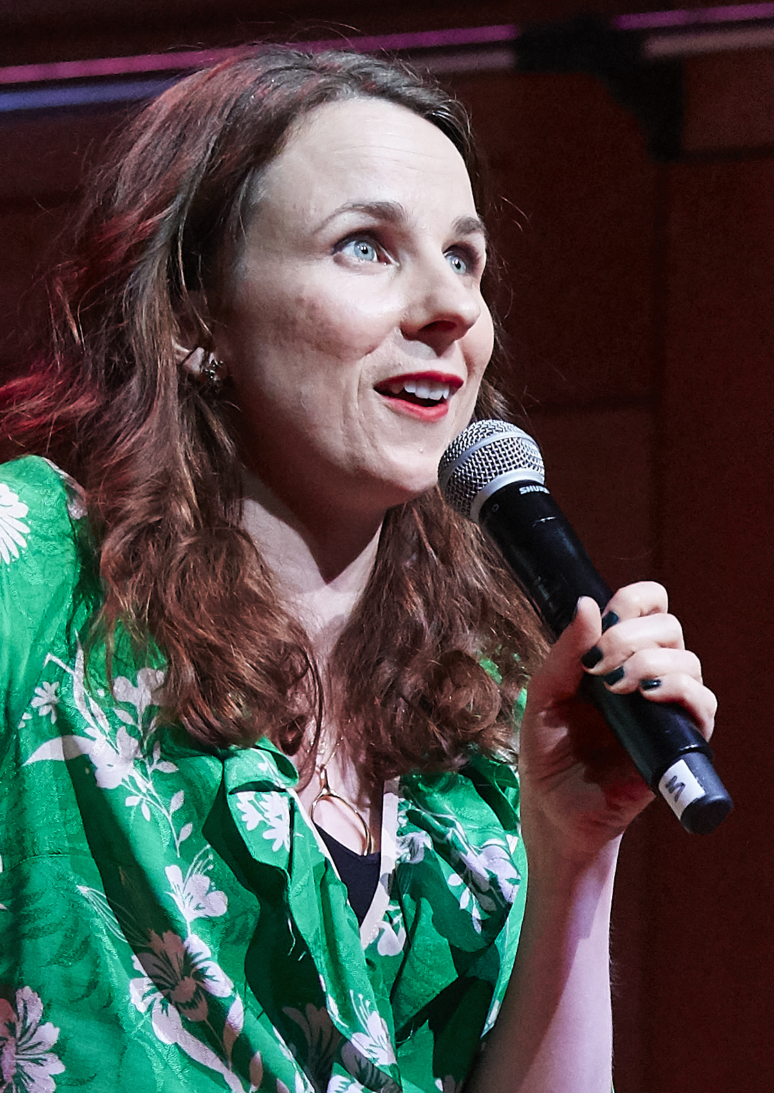 Cariad Lloyd